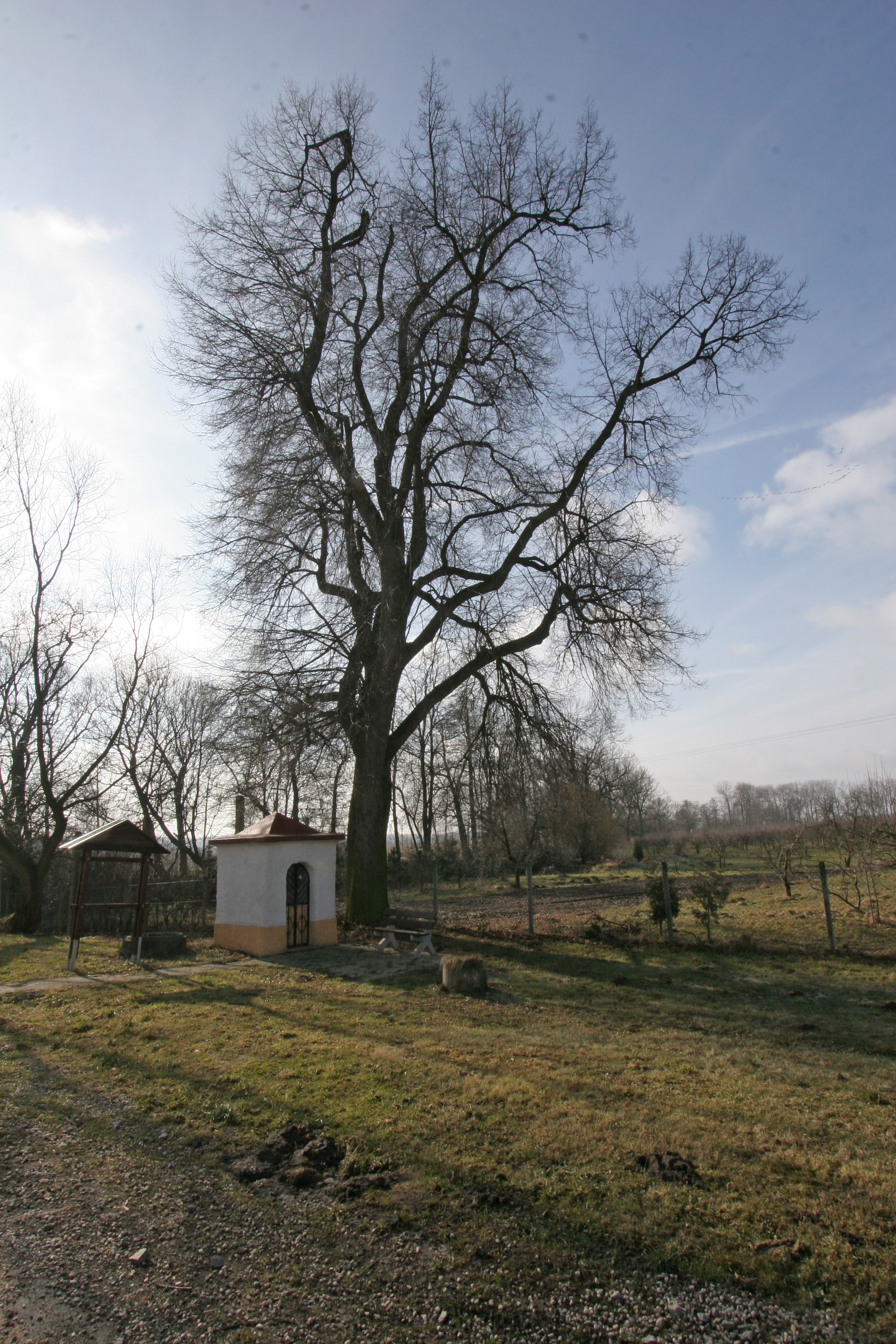 Podůlšany kaplička pod lípou